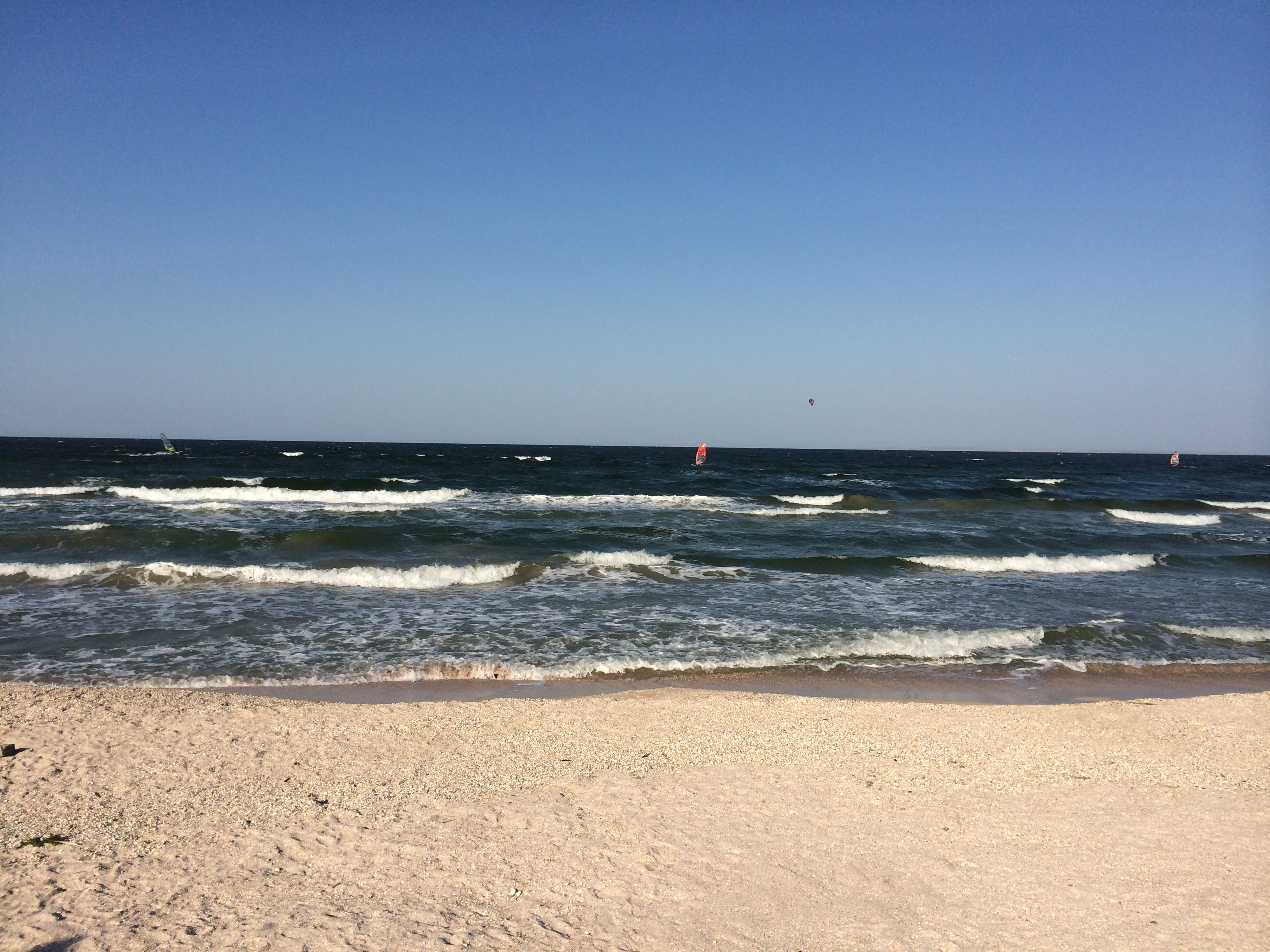 Пляж "Татарка" в Казантипском заливе